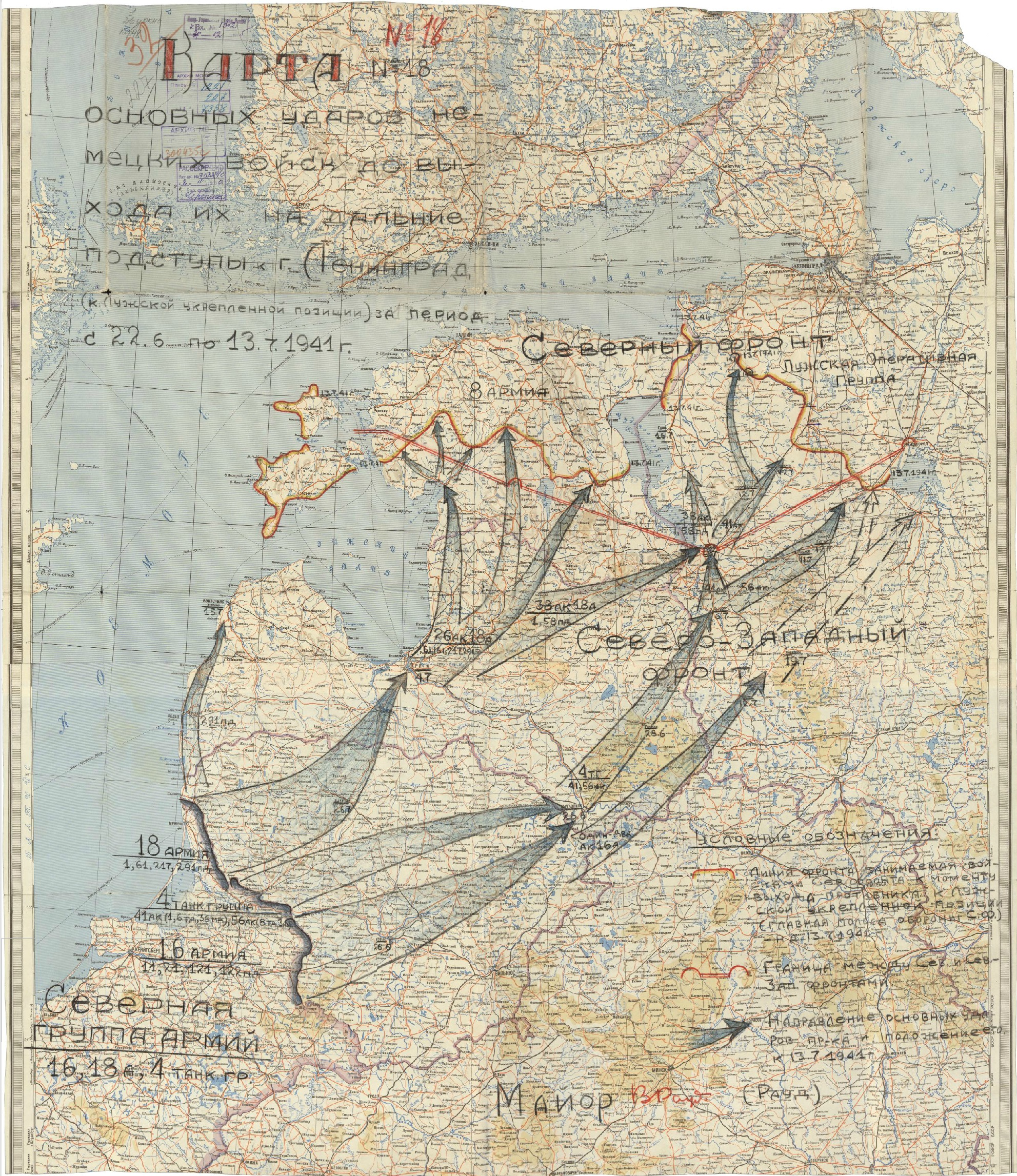 Карта основных ударов немецких войск до выхода их на дальние подступы к г. Ленинград (к Лужской укрепленной позиции) за период с 22.06.1941 г. по 13.07.1941 г.